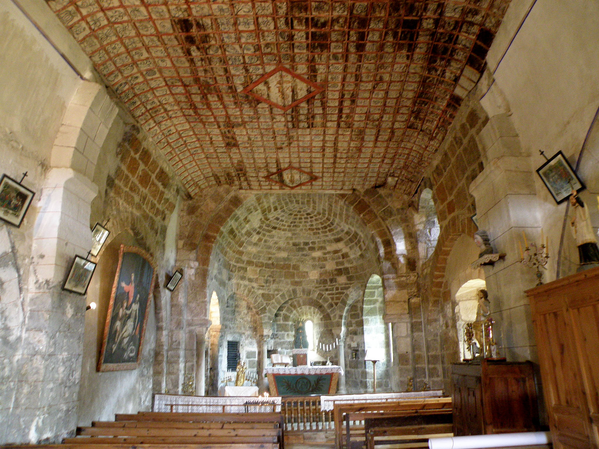 Bourg médiéval de Chalencon, appartenant à la comm. de Saint-André-de-Chalencon, dép. de la Haute-Loire, France (région Auvergne). Chapelle du XIe s., nef et abside en cul-de-four. Plafond lambrissé mis en place fin XVIIe.